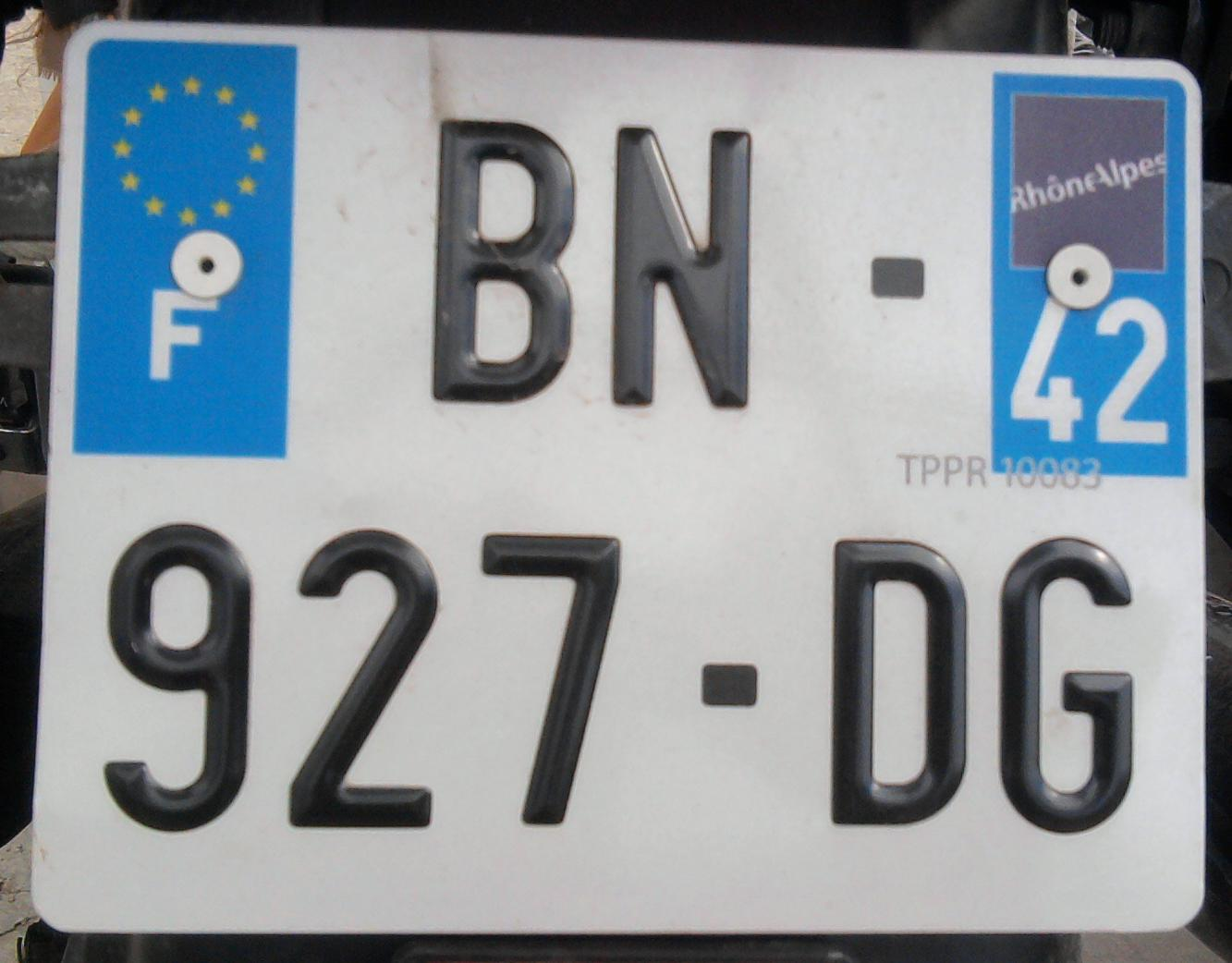 Номерний знак